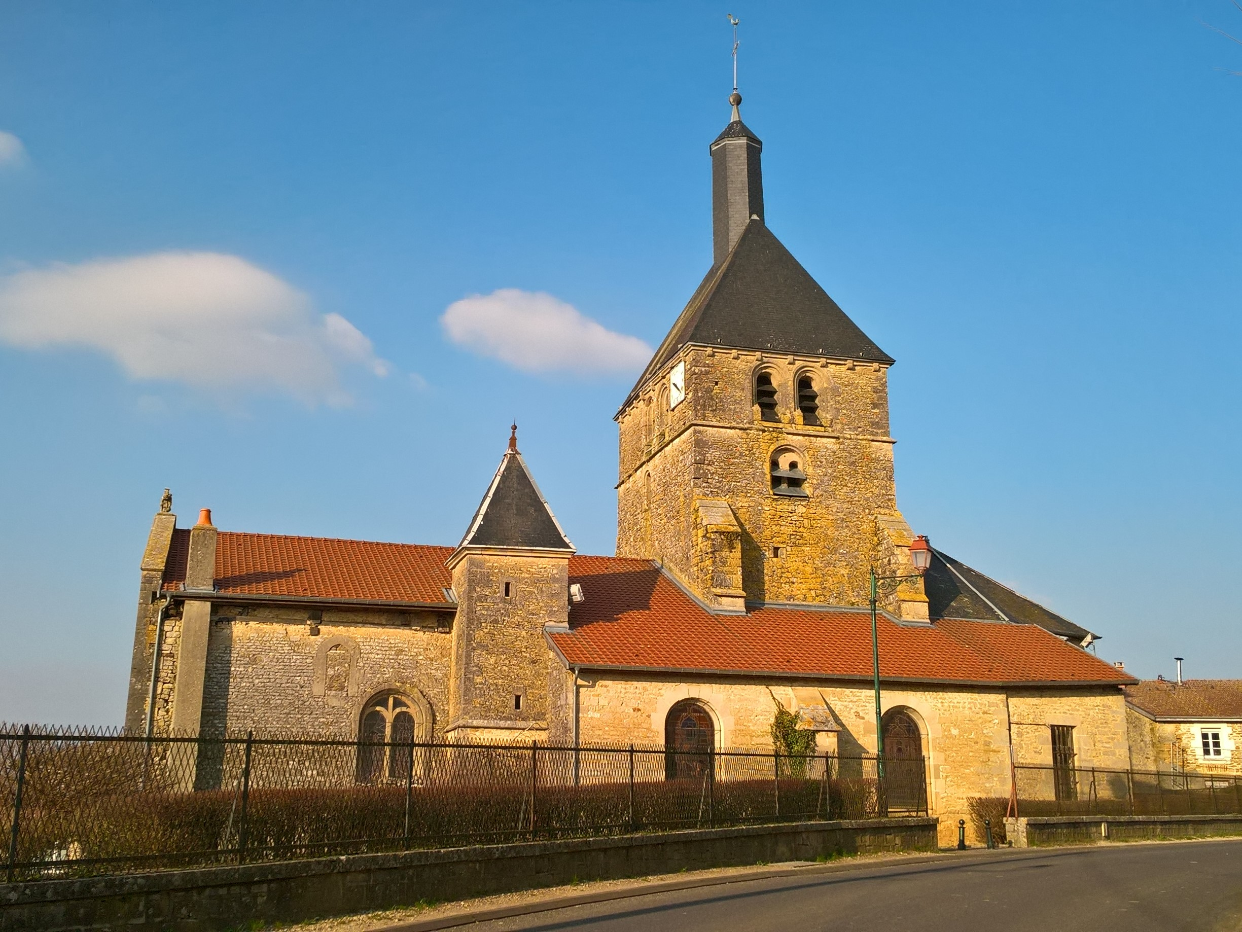 Dommartin-le-Franc, église Saint-Martin vue du sud.